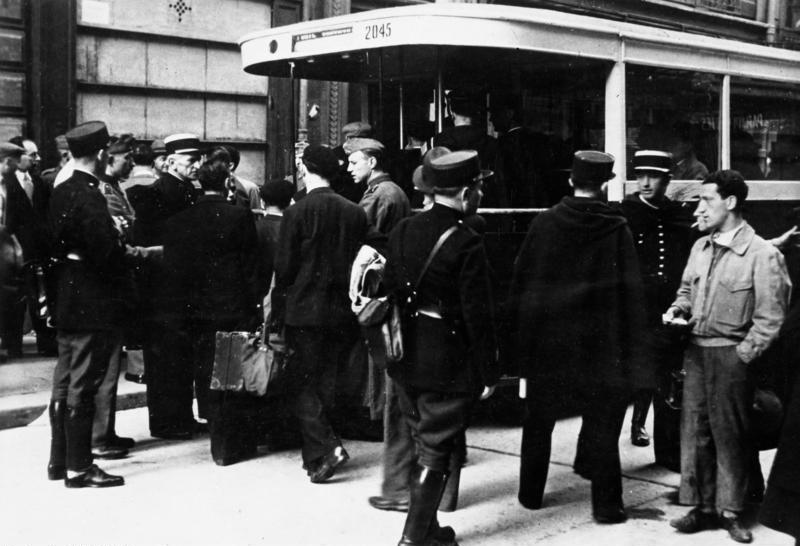 Frankreich, Paris, Judenverfolgung Zentralbild: August 1941 Weltkrieg 1941 Frankreich, besetztes Gebiet. Festnahme von Juden. Die Festgenommenen werden in Paris mit Autobussen abtransportiert. 8281-41 ADN-ZB/Archiv: Frankreich unter der Okkupation des deutschen Faschismus und des Vichy-Regimes 1940/44. In Paris festgenommene Juden wurden mit Autobussen abtransportiert.